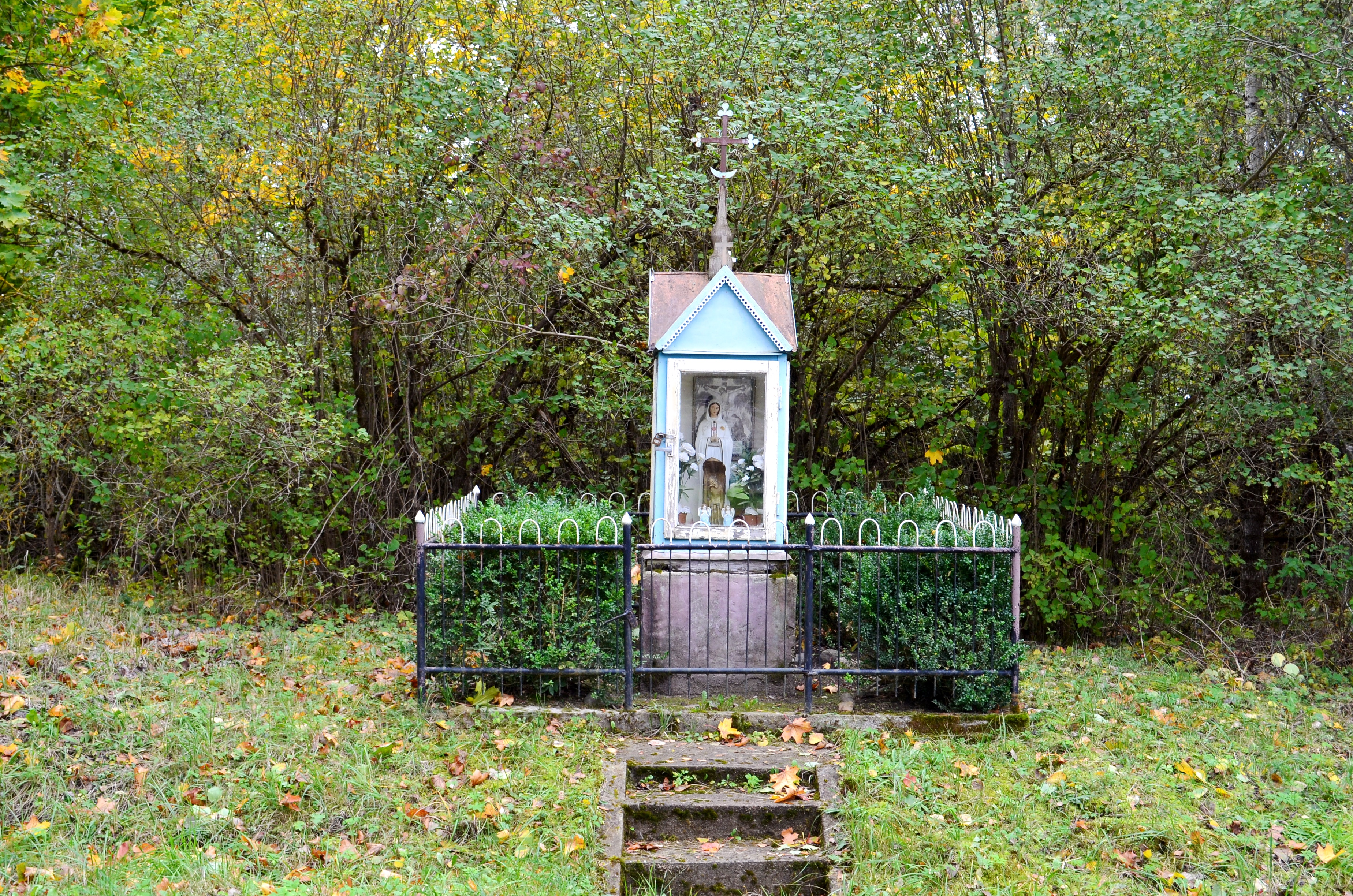 Koplytėlė, Pupžiubiai, Rietavo sav.